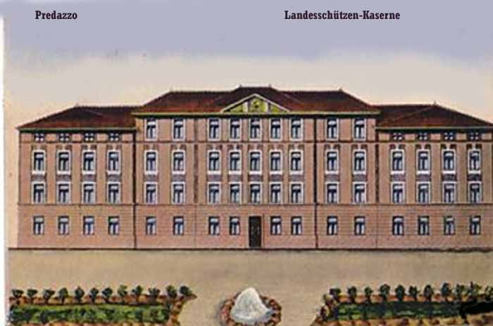 k.k. Landesschützenkaserne in Predazzo